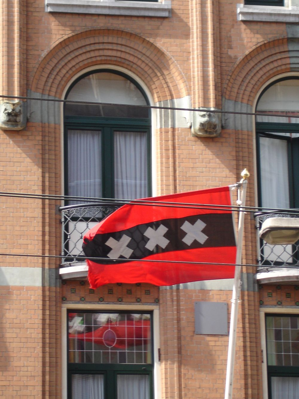 Flag of Amsterdam